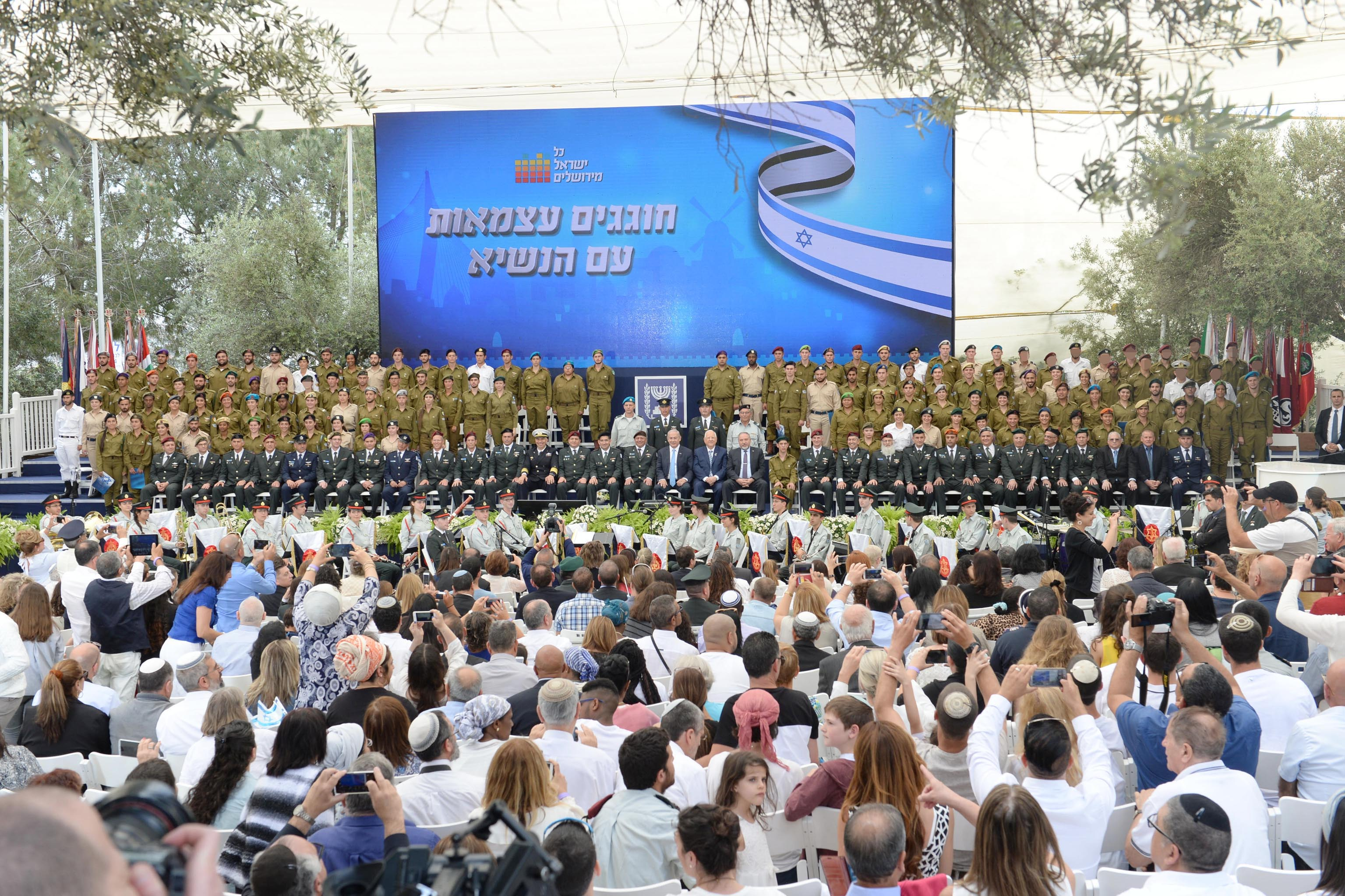 אירוע "כל ישראל מירושלים" במסגרת הענקת תעודות ההצטיינות "אות מצטיין הנשיא" ל-121 חיילים וחיילות בבית הנשיא יום העצמאות ה-69